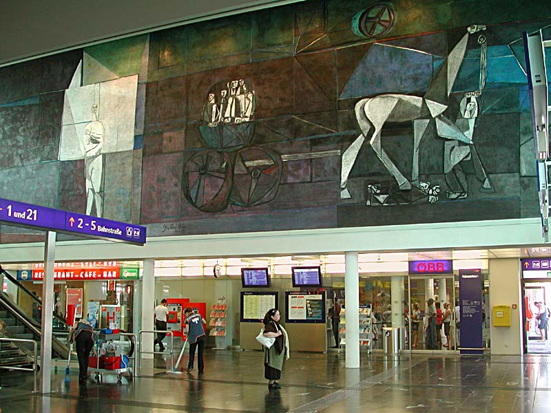 Giselbert Hoke: Wandfresko "Wand der Kläger" am Klagenfurter Hauptbahnhof (Ausschnitt)